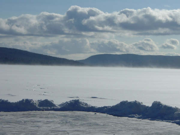 Vue sur le lac Squatec et les Appalaches.